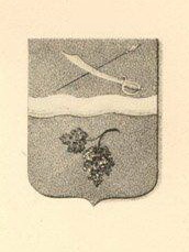 Герб Донецкого пикинерного полка русской армии, 1776-1784.